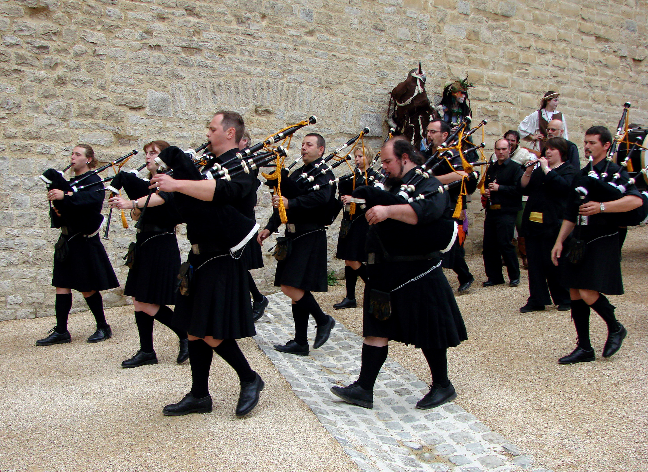 Bagad Arduinn,groupe ardennais de musique celtique,au festival médiéval de Sedan,le 20 Mai 2007.